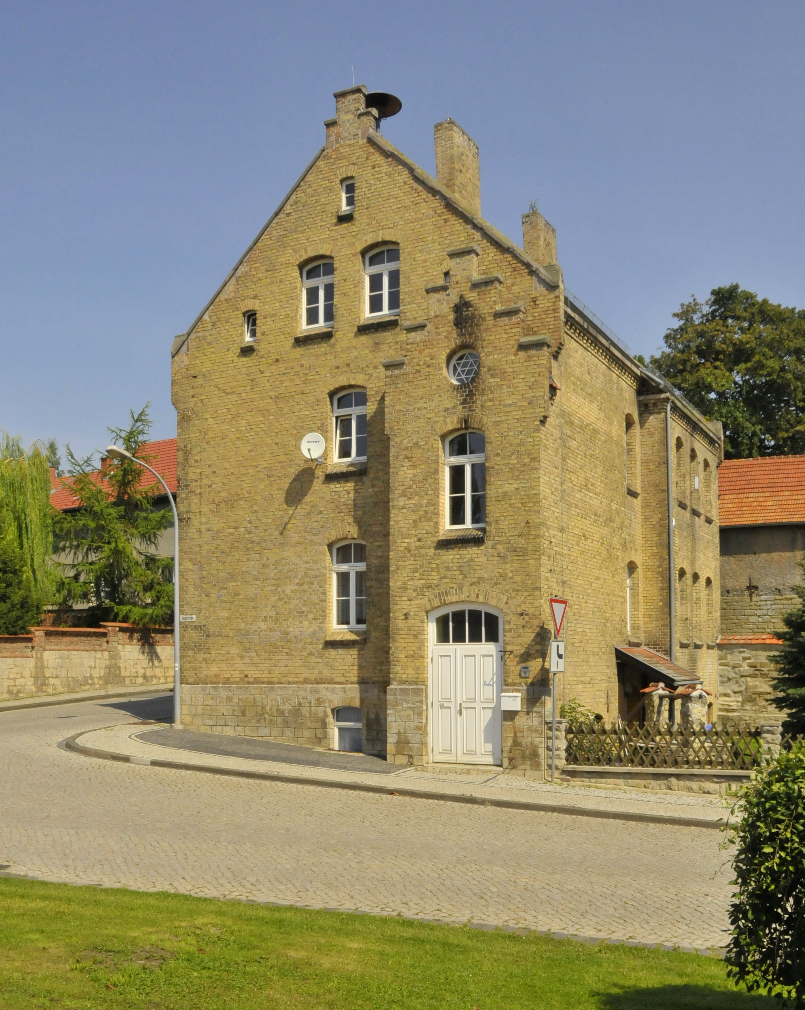 Gebäude in Haussömmern